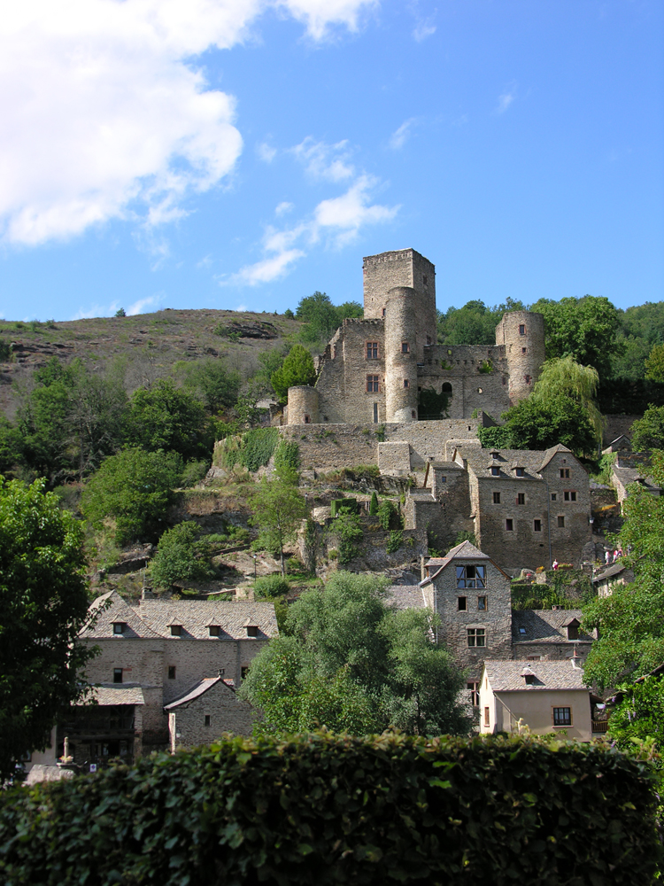 Photographie du Château de Belcastel (Aveyron).